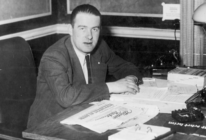 Der Gauleiter von Wien: Globotschnigg [Globocnik] 6949/38